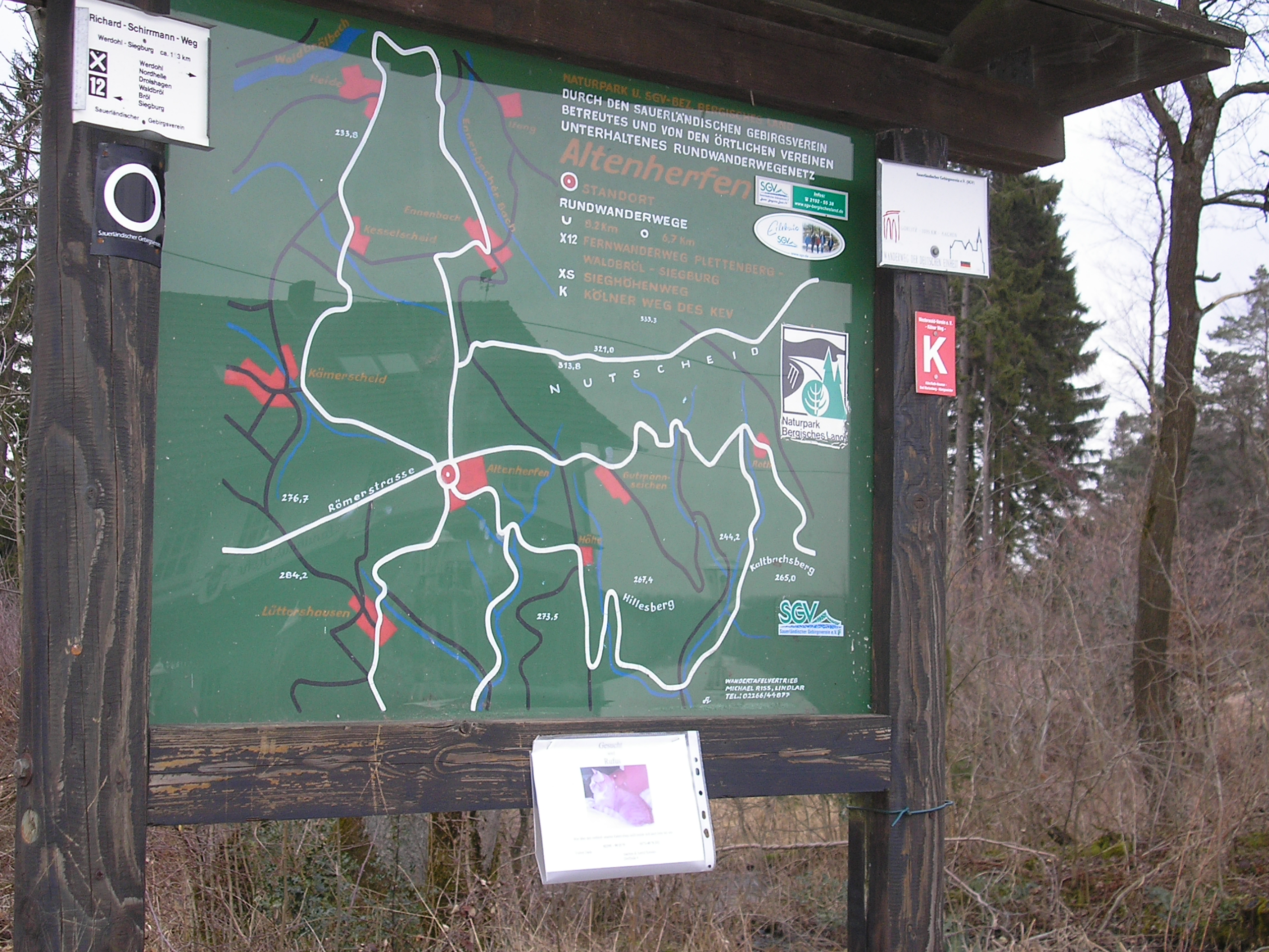 Wanderweg der Deutschen Einheit, Altenherfen, Gemeinde Windeck